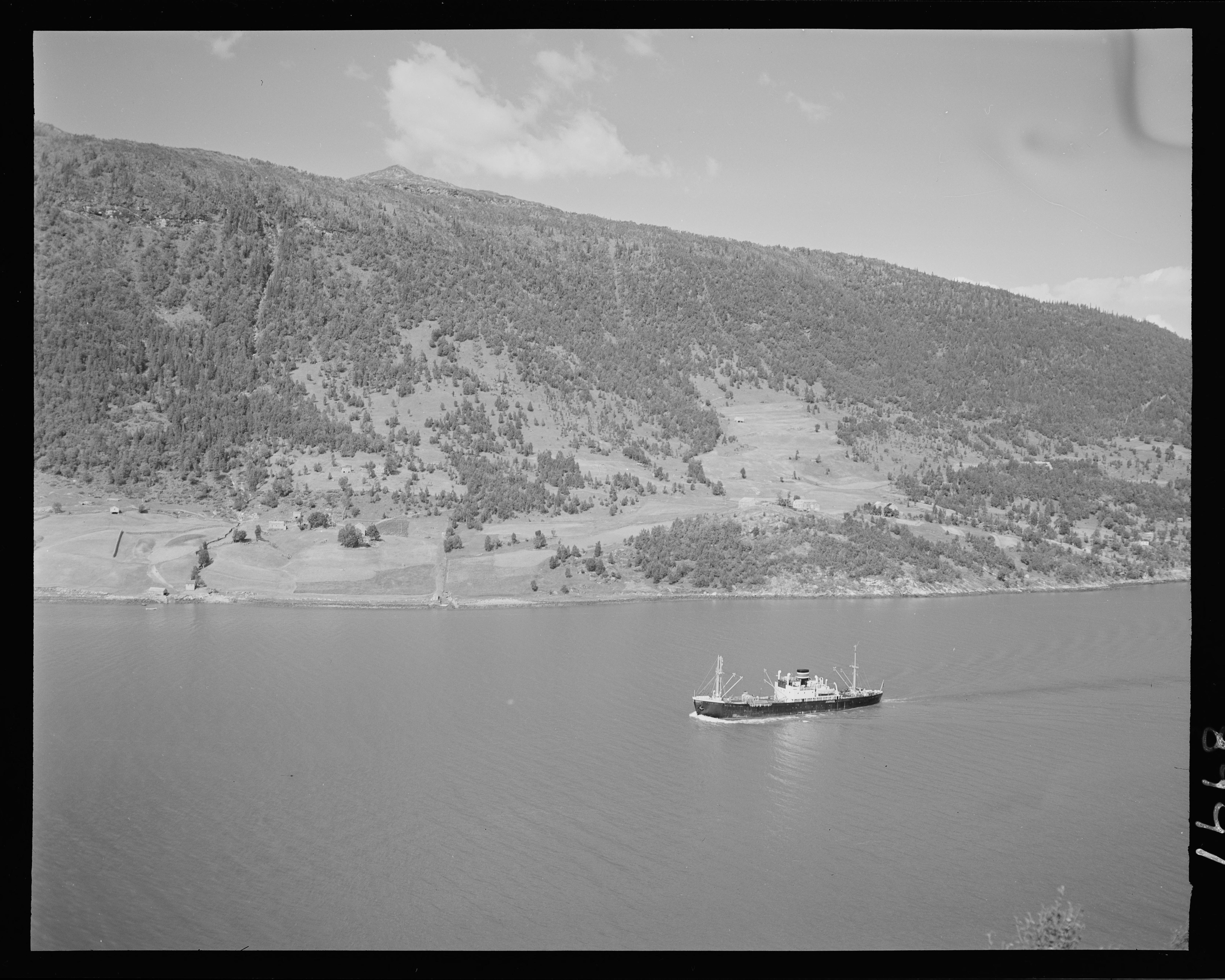 Bildet er hentet fra Nasjonalbibliotekets bildesamling. Anmerkninger til bildet var: Fotograf : ukjent Finneidfjorden, Hemnes, Nordland